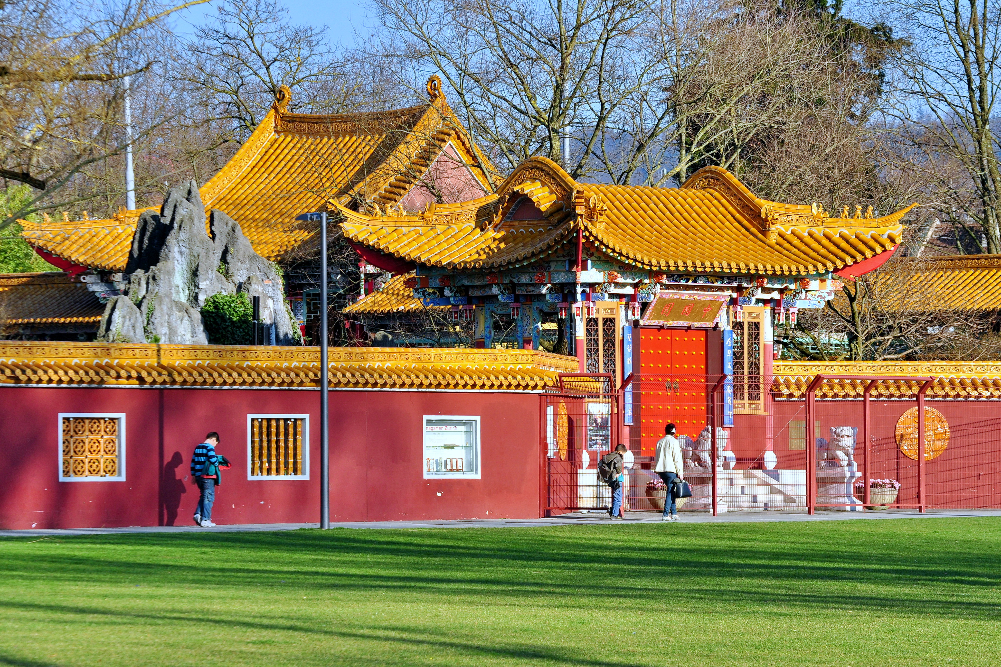 Chinagarten in Zürich-Seefeld (Switzerland)